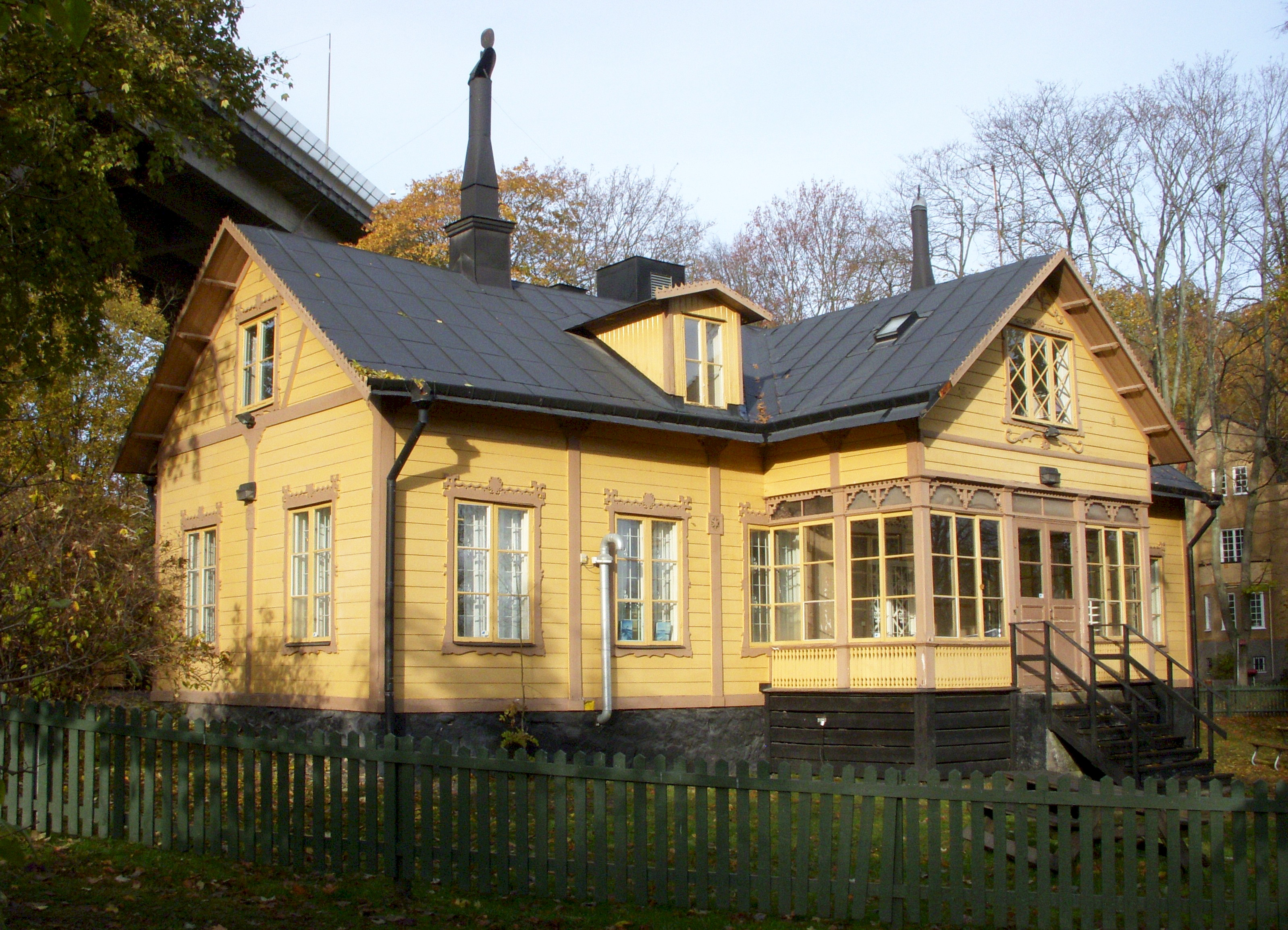 Blommesbergs trävilla "hundkojan", en rest av ursprungsbebyggelsen